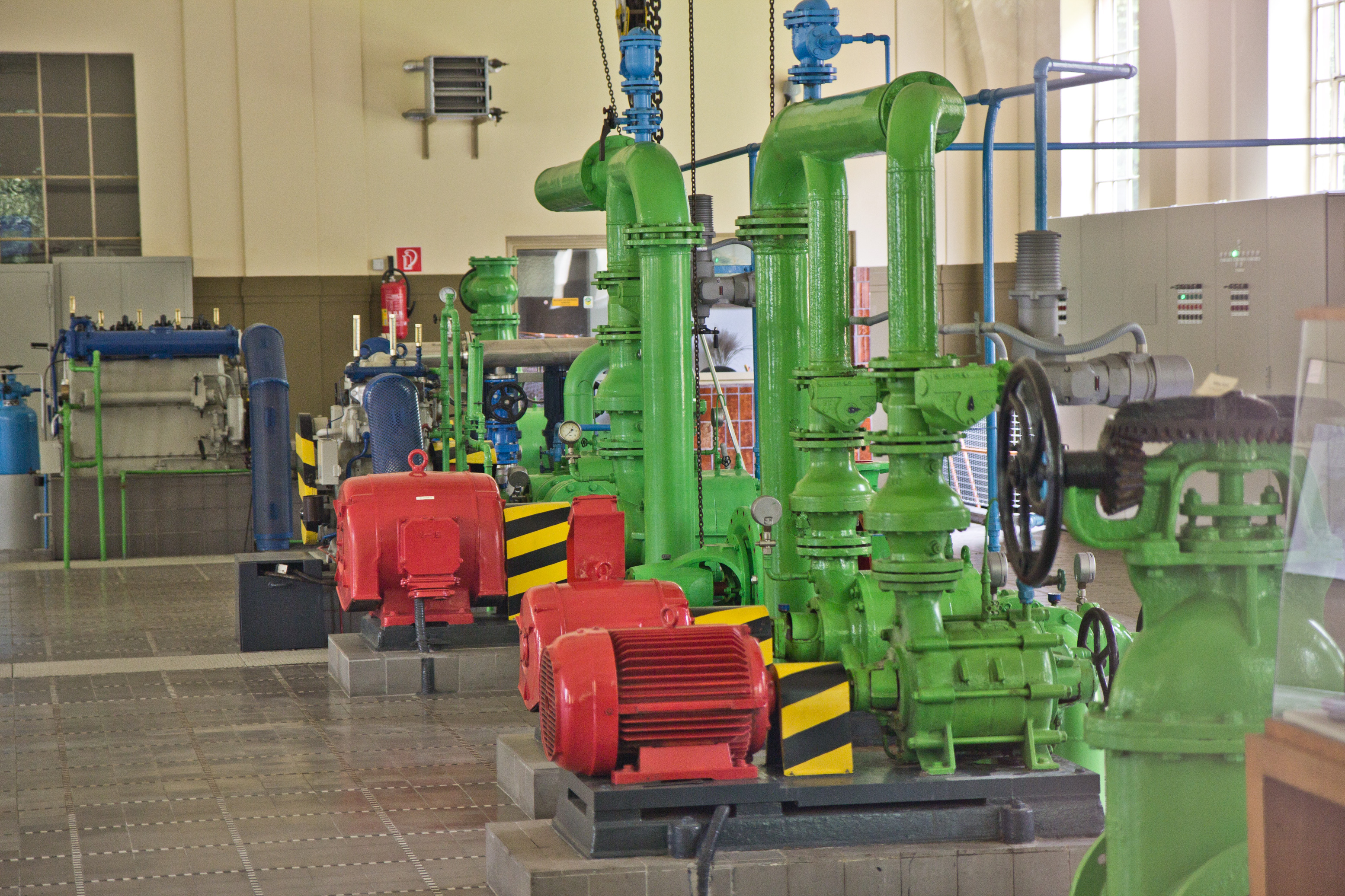 Wasserwerk III in Hanau-Kesselstadt (Hessen)